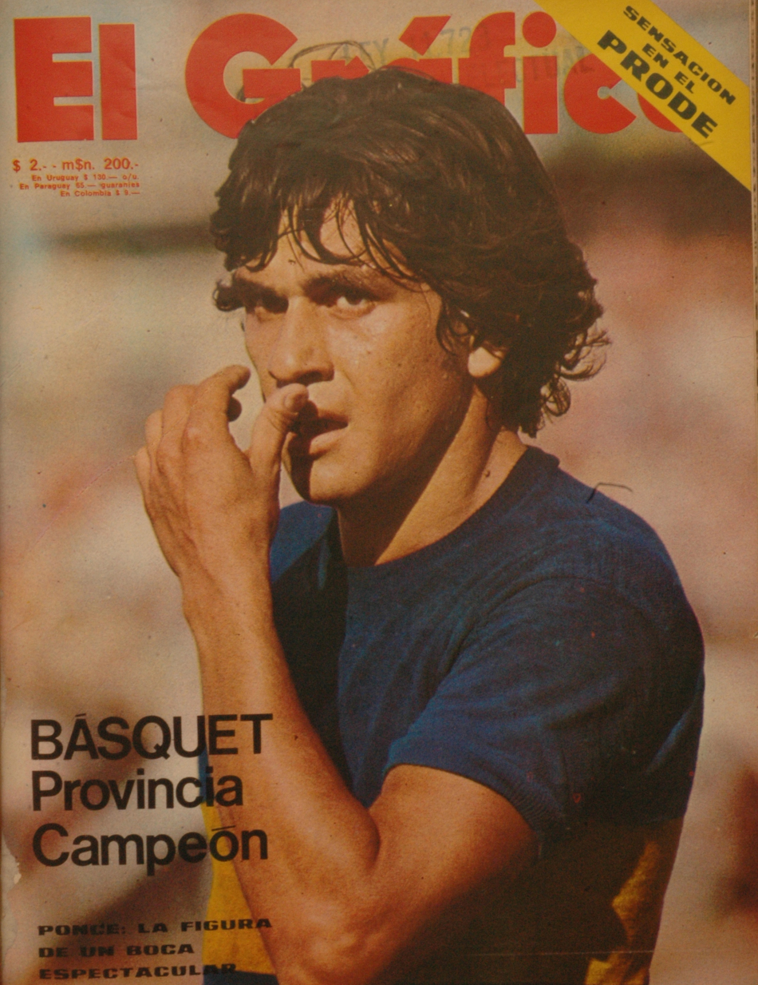 El Grafico del 11 de Abril de 1972. Edicion 2740